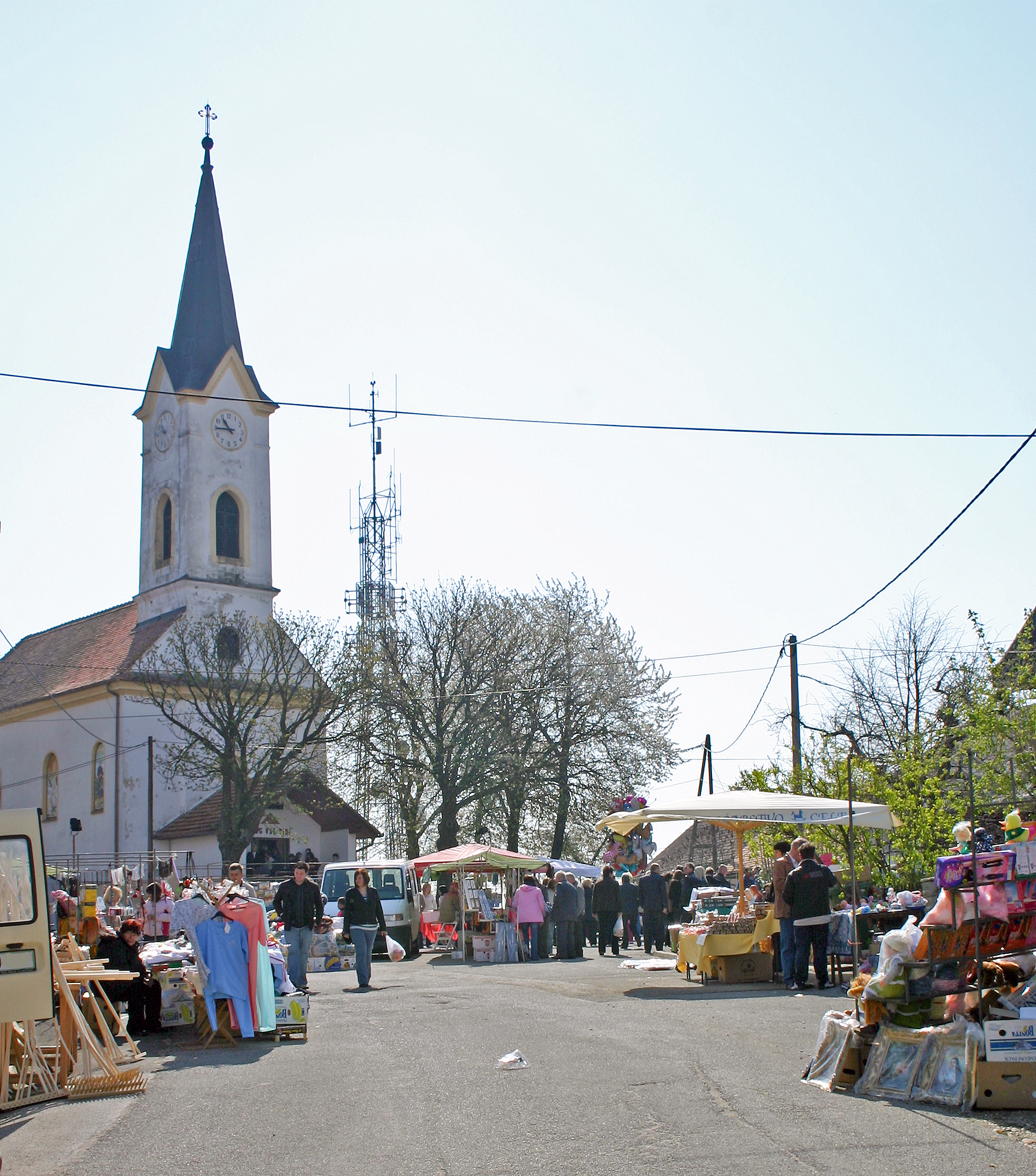 «Topla prouška» Pečarovci 2008